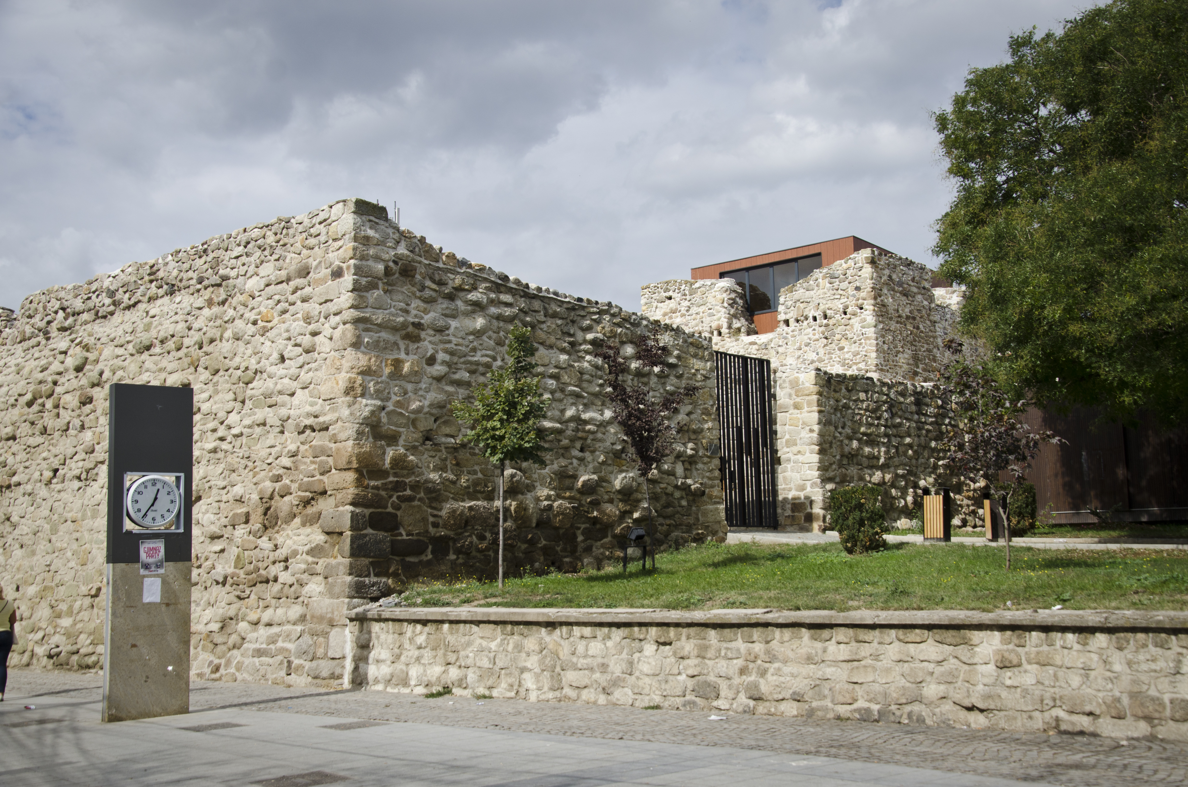 Kështjella “Kalaja” Kulla e Vjetër - Ambienturë